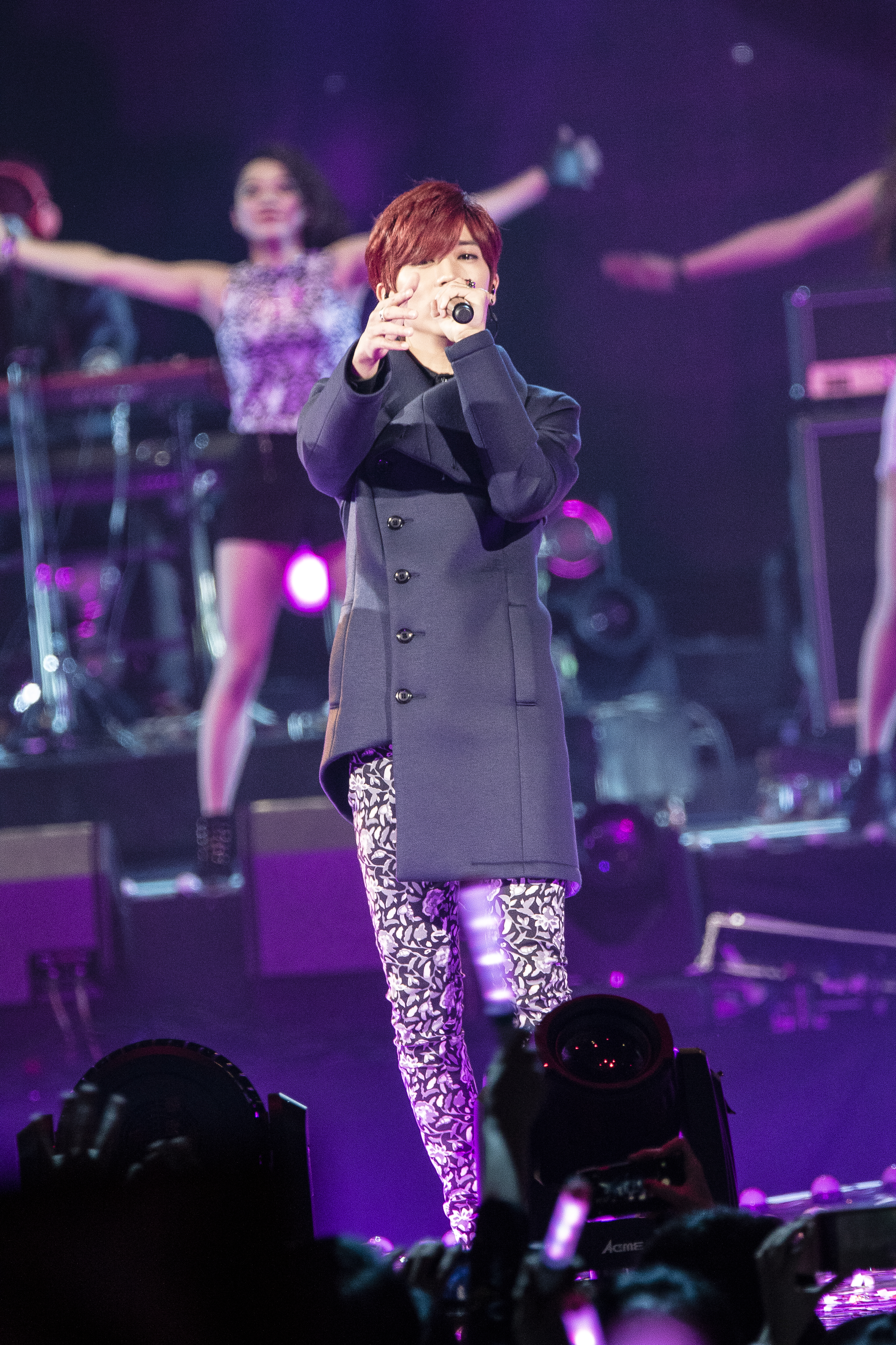 第十屆 KKBOX 風雲榜